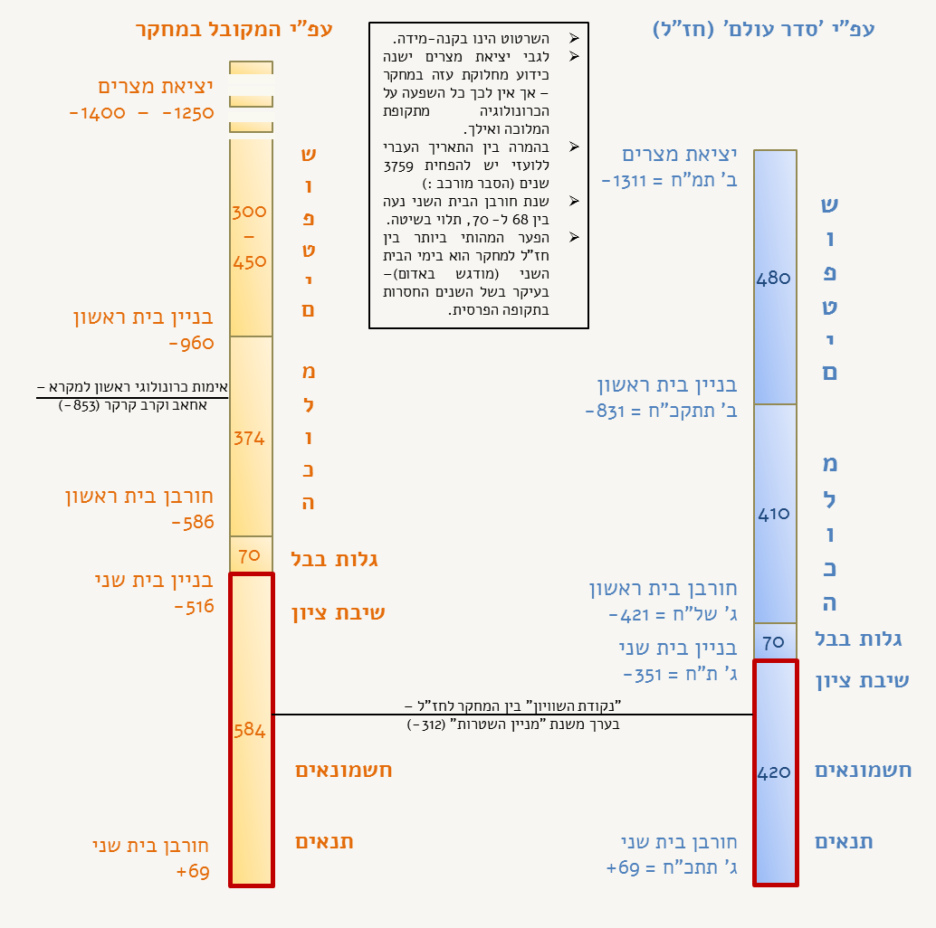 סדרי הזמנים מיציאת מצרים ועד חורבן הבית השני - חז"ל ('סדר עולם') לעומת המחקר המקובל